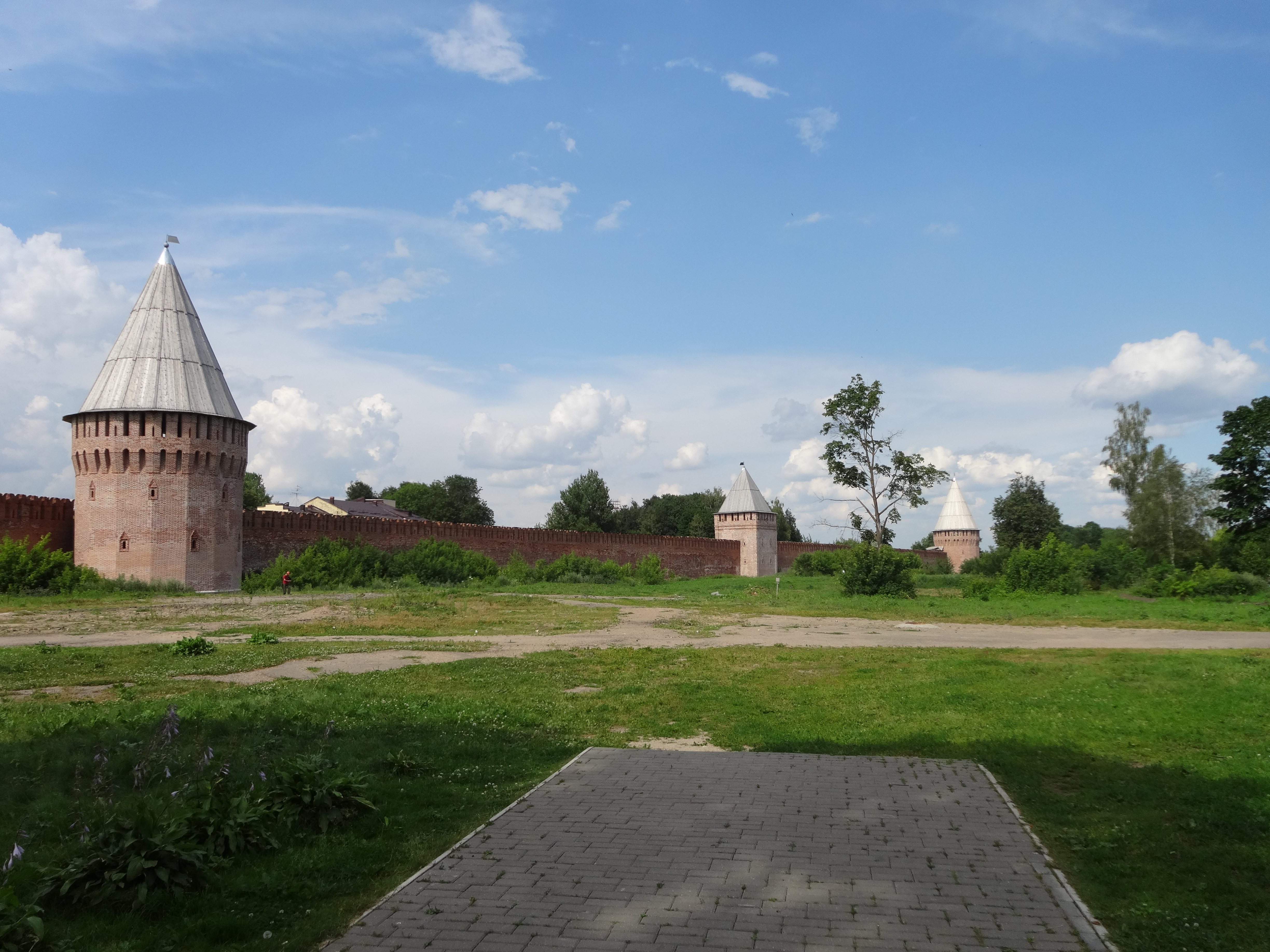 in Smolensk